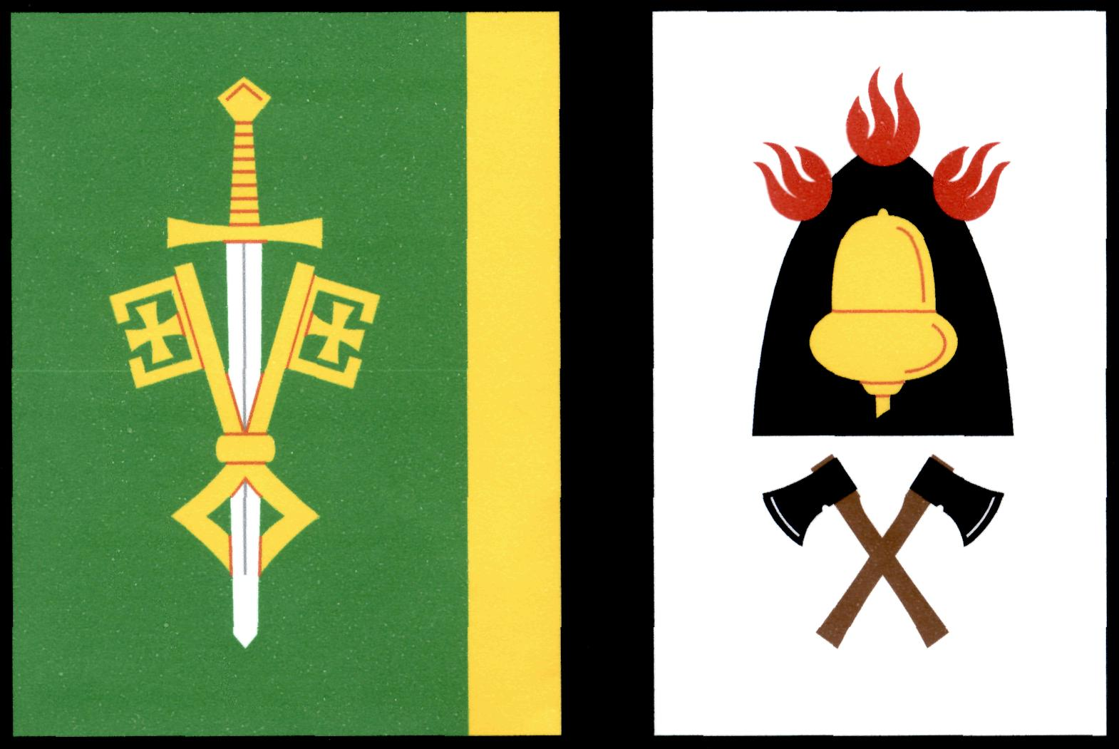 Vlajka obce Milíře (okres Tachov)